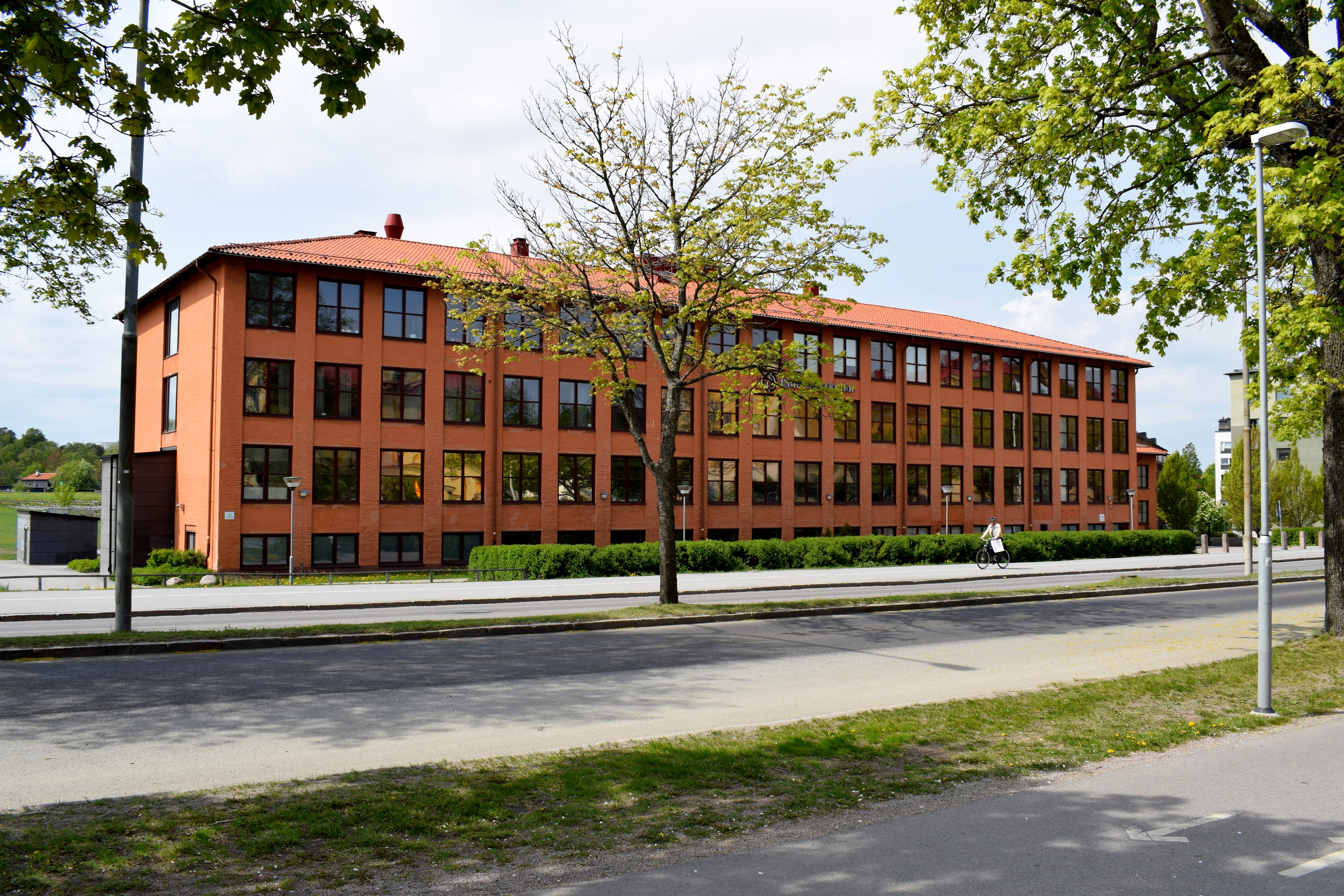 Byggnaden på Dag Hammarskjölds väg 31 i Uppsala uppfördes för Försvarets läroverk, sedermera Försvarets gymnasieskola. Närmre 10.000 elever från Armén, Marinen och Flygvapnet fick här sin utbildning i civila läroämnen åren 1943-1982.